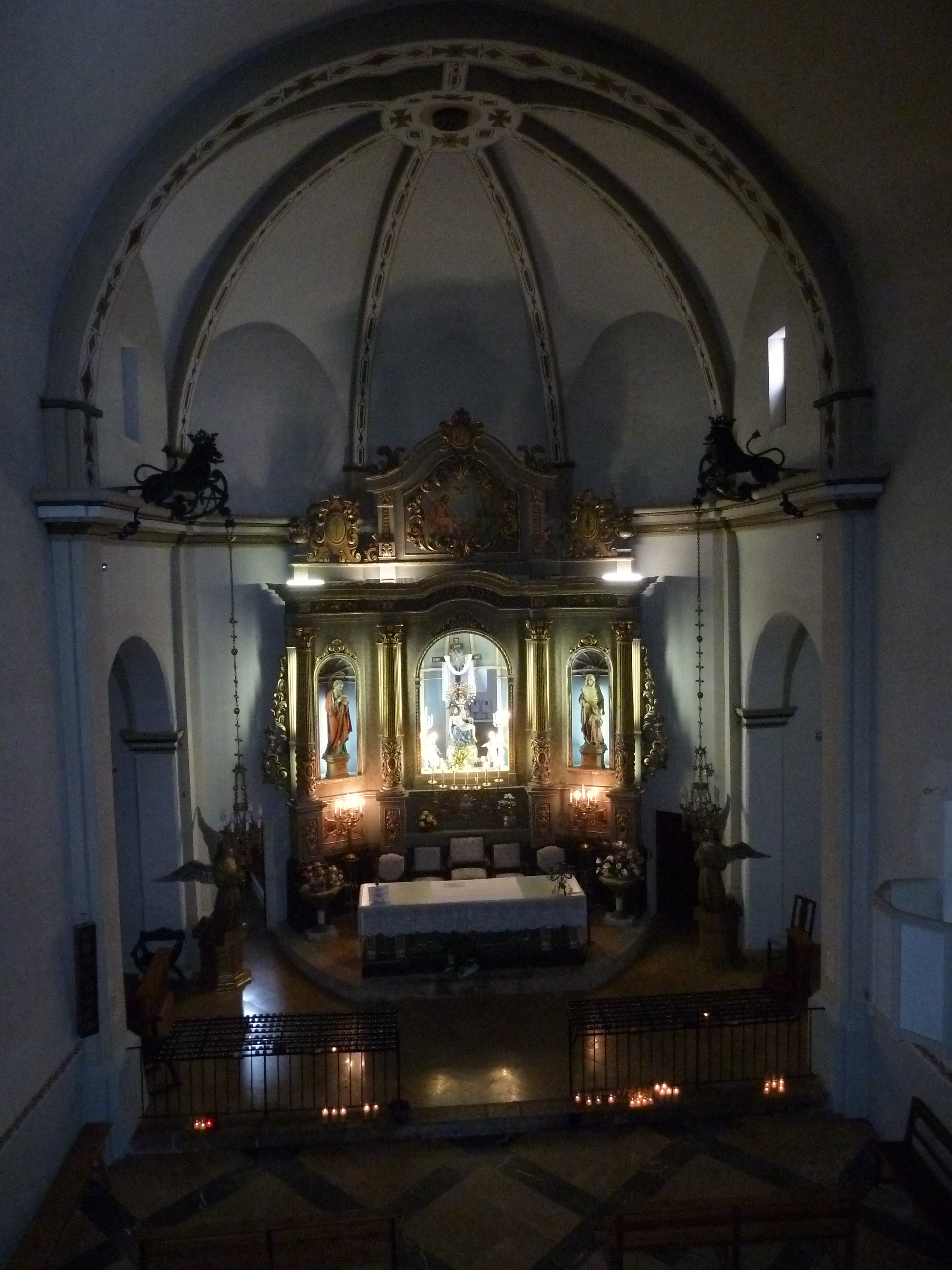 Ulldecona